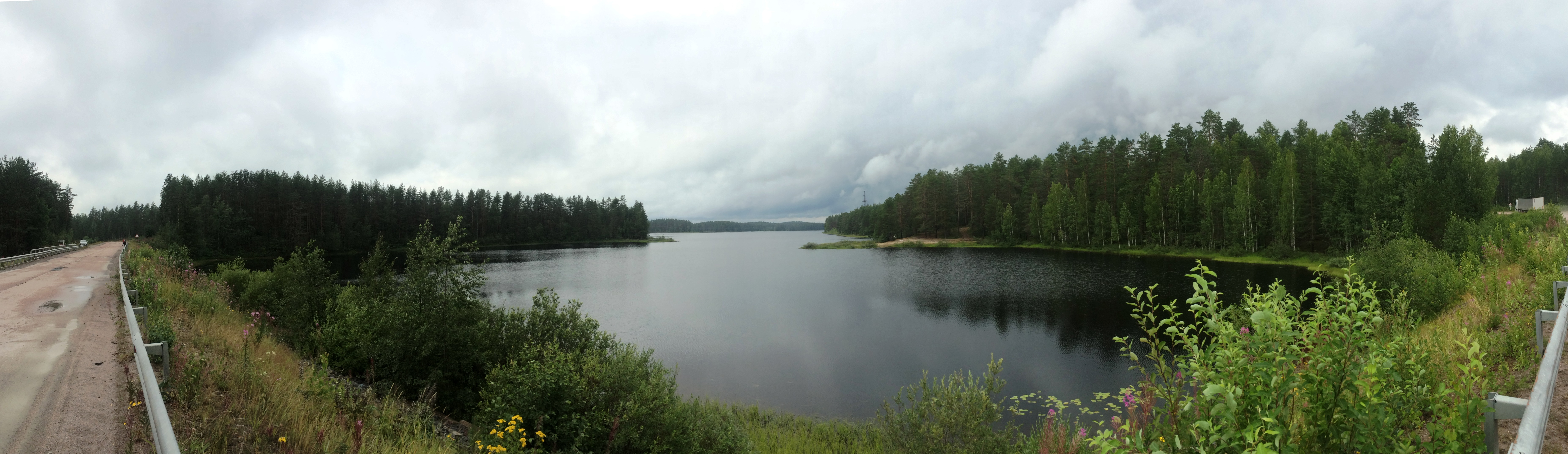 Салменъярви